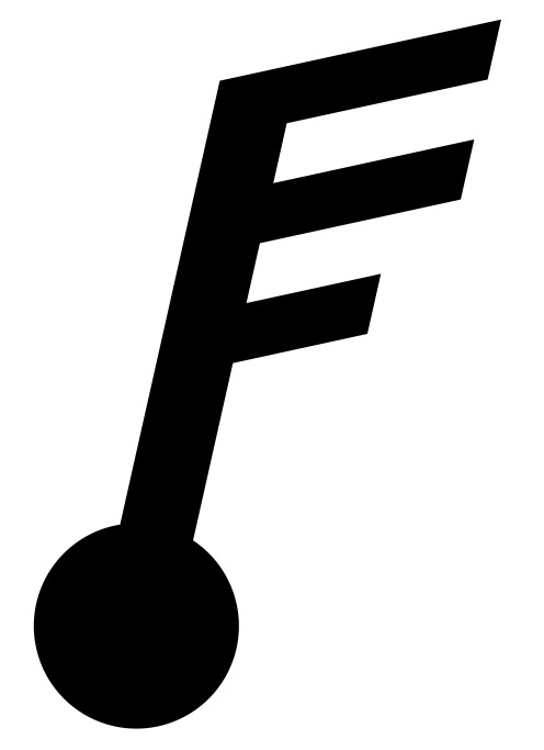 Force 5 Klassenzeichen selbst gezeichnet